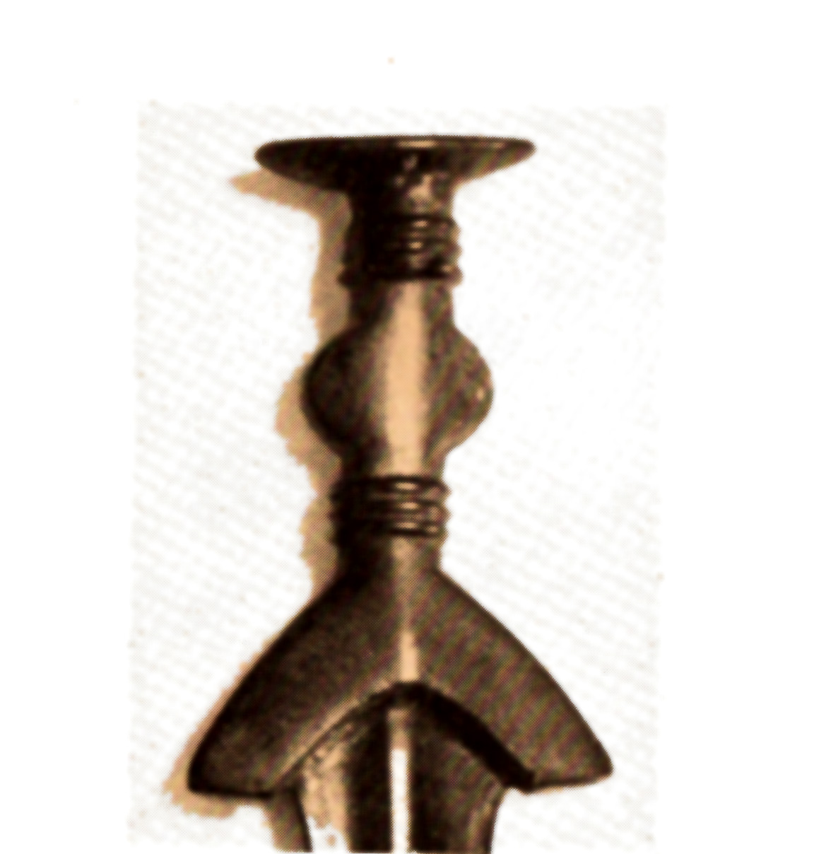 Pommeau d'une épée celte trouvée à Arfuyen, près de Malaucène